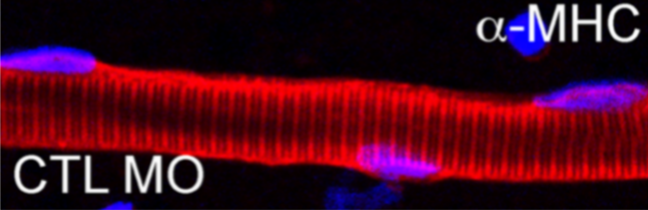 Figura 5. Hipotrofia de miofibra en morphant de miotubularina. (A) Representante de miofibrilla de control (CTL) en embriones. Las fibras se inmunotinaron con un anticuerpo contra la cadena pesada de miosina (a-MHC). Barra de escala = 20 mm.